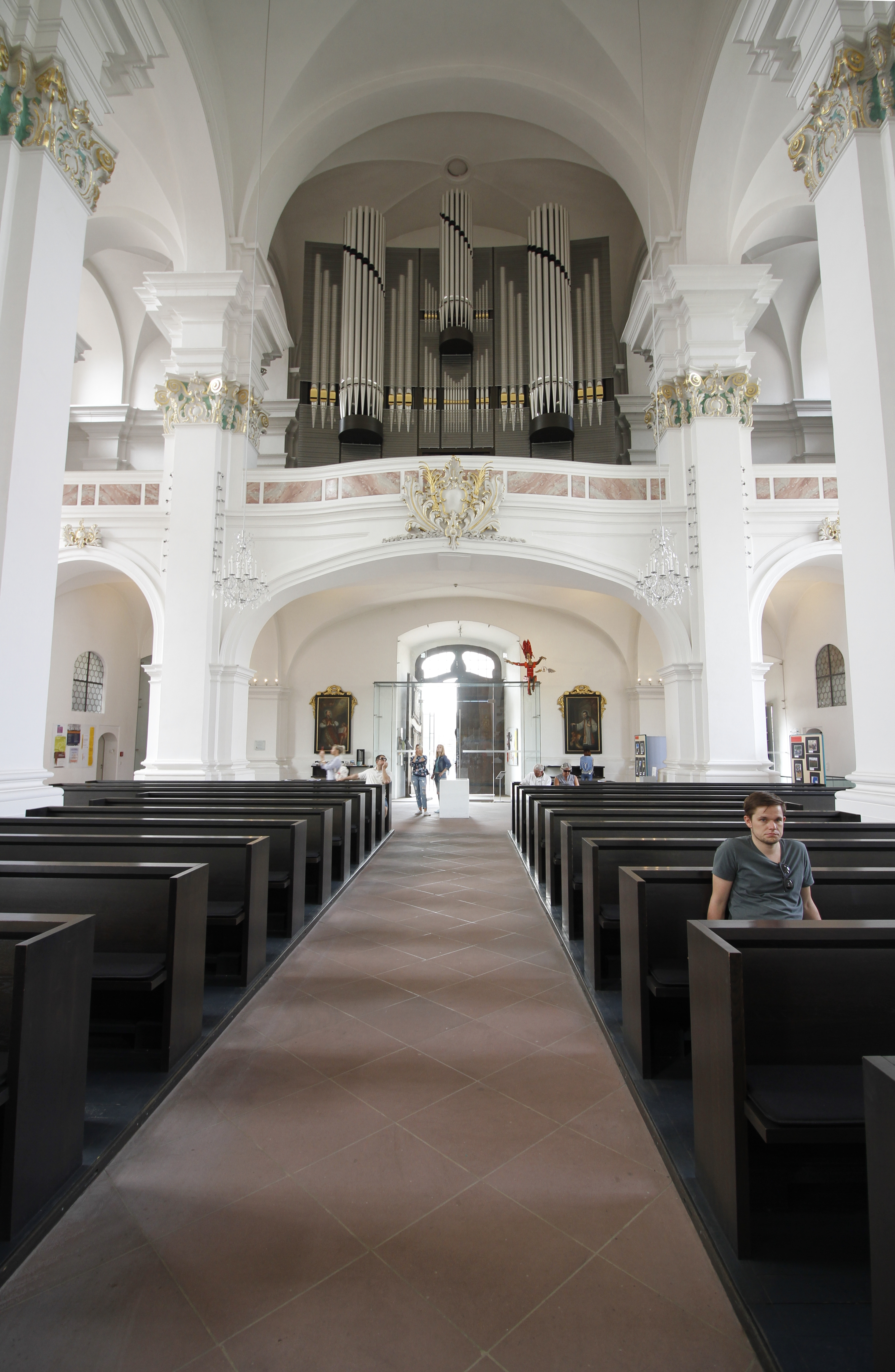 Jesuitenkirche - Heidelberg - Germany